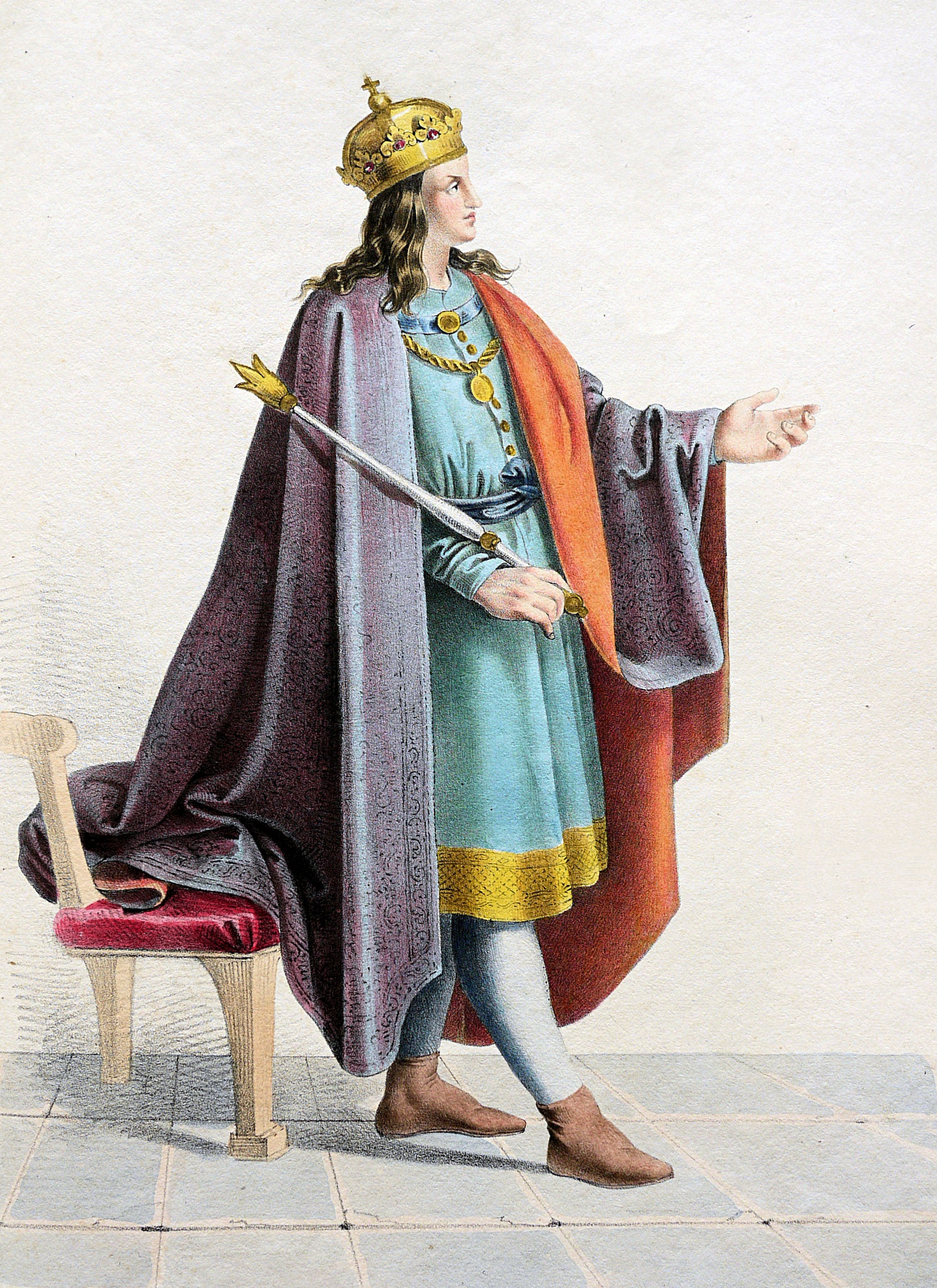 Stephan IV. (1133-1165), König von Ungarn etc. Lithographie von Josef Kriehuber nach einer Zeichnung von Moritz von Schwind aus Ungerns Erste Heerführer Herzoge und Koenige In einer Reihe von Bildnissen von Bela bis auf Seine Majestät Franz I. Kaiser Von Österreich König Von Ungern &c., &c. Wien : Lithographisches Institut ;ca. 1828